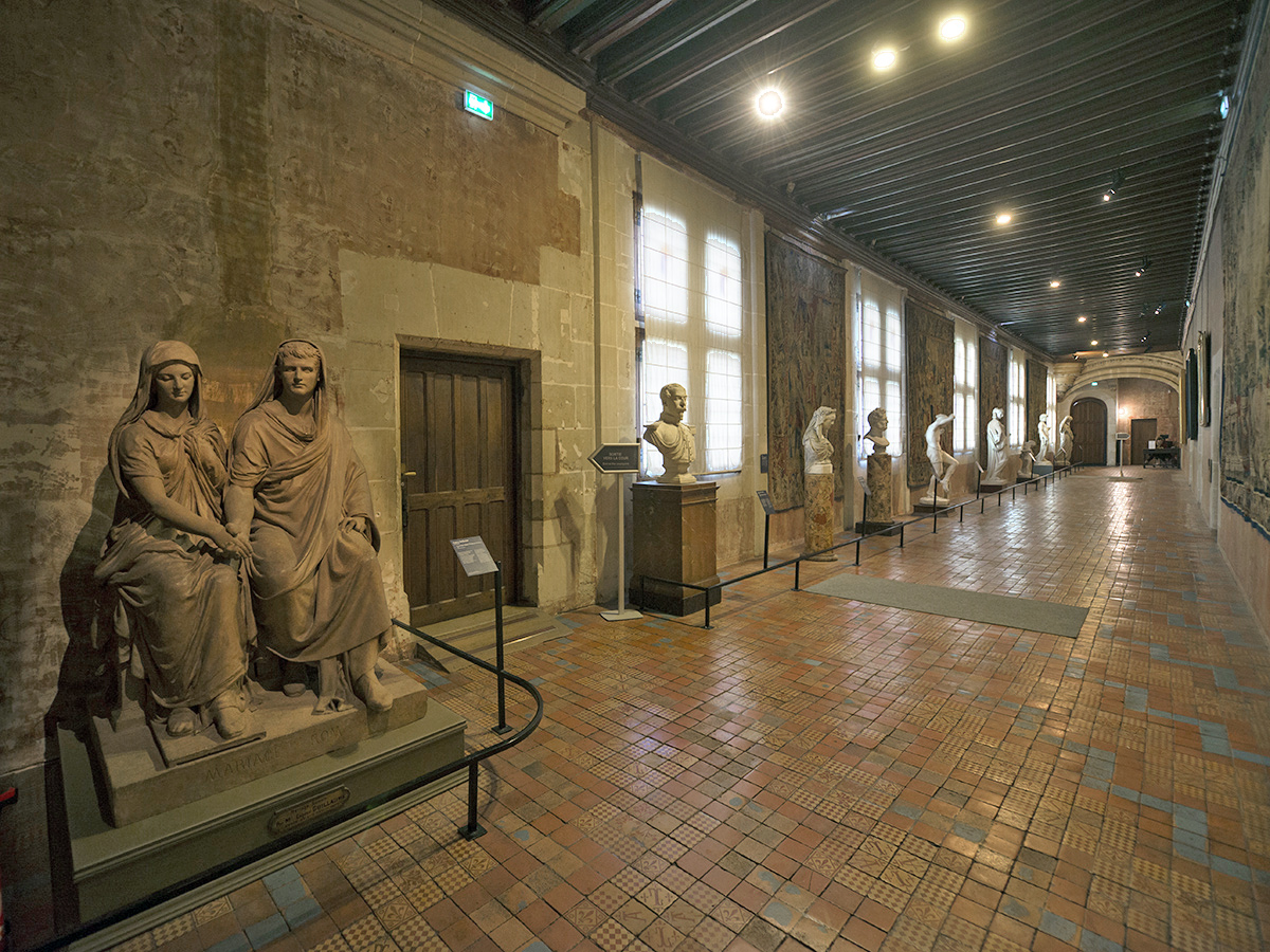 Couloir du musée des beaux-arts de Blois, novembre 2018.